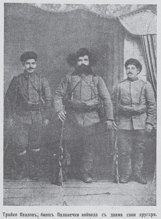 Krushevo revolutionaries